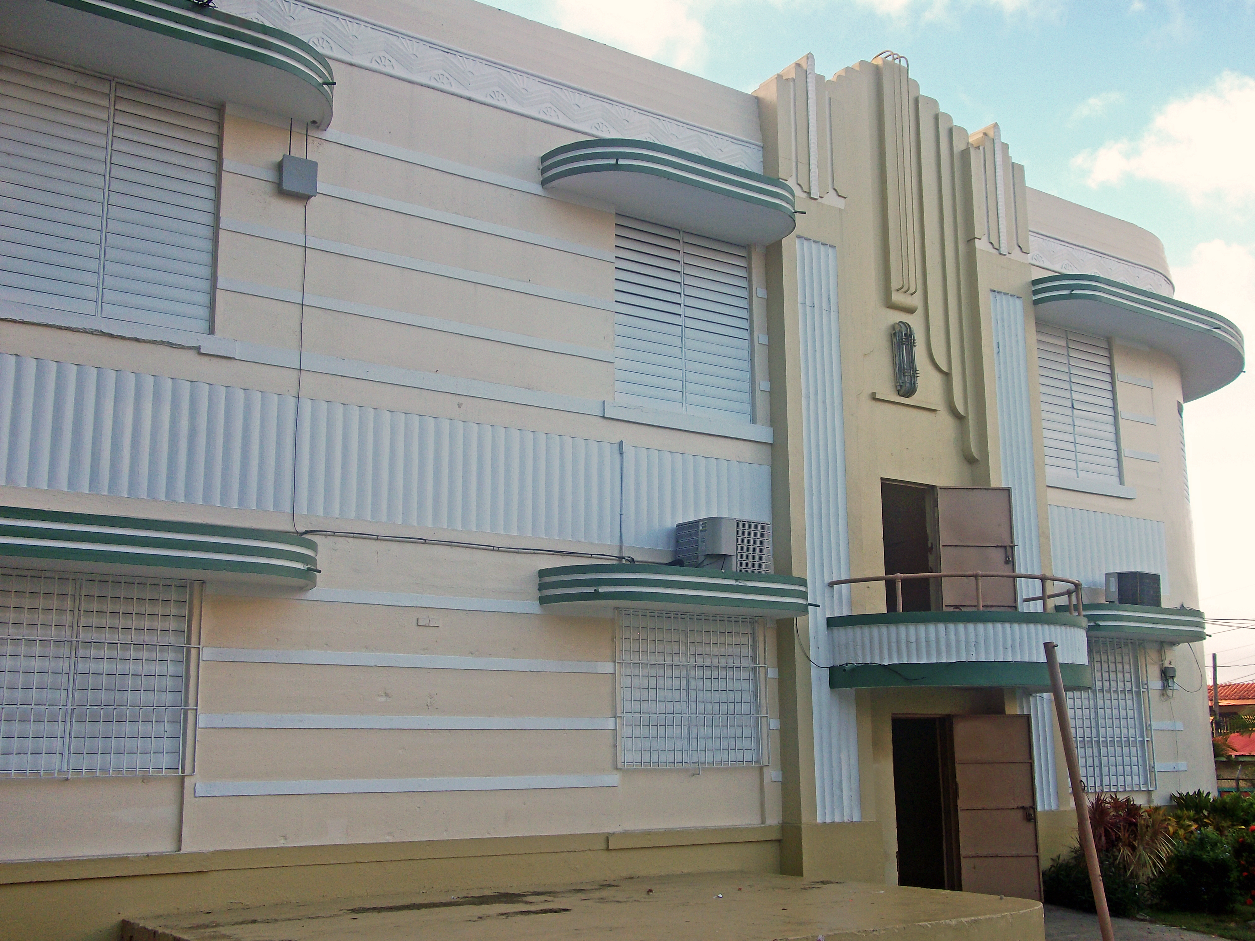 Escuela Luis Muñoz Marín - Centro.